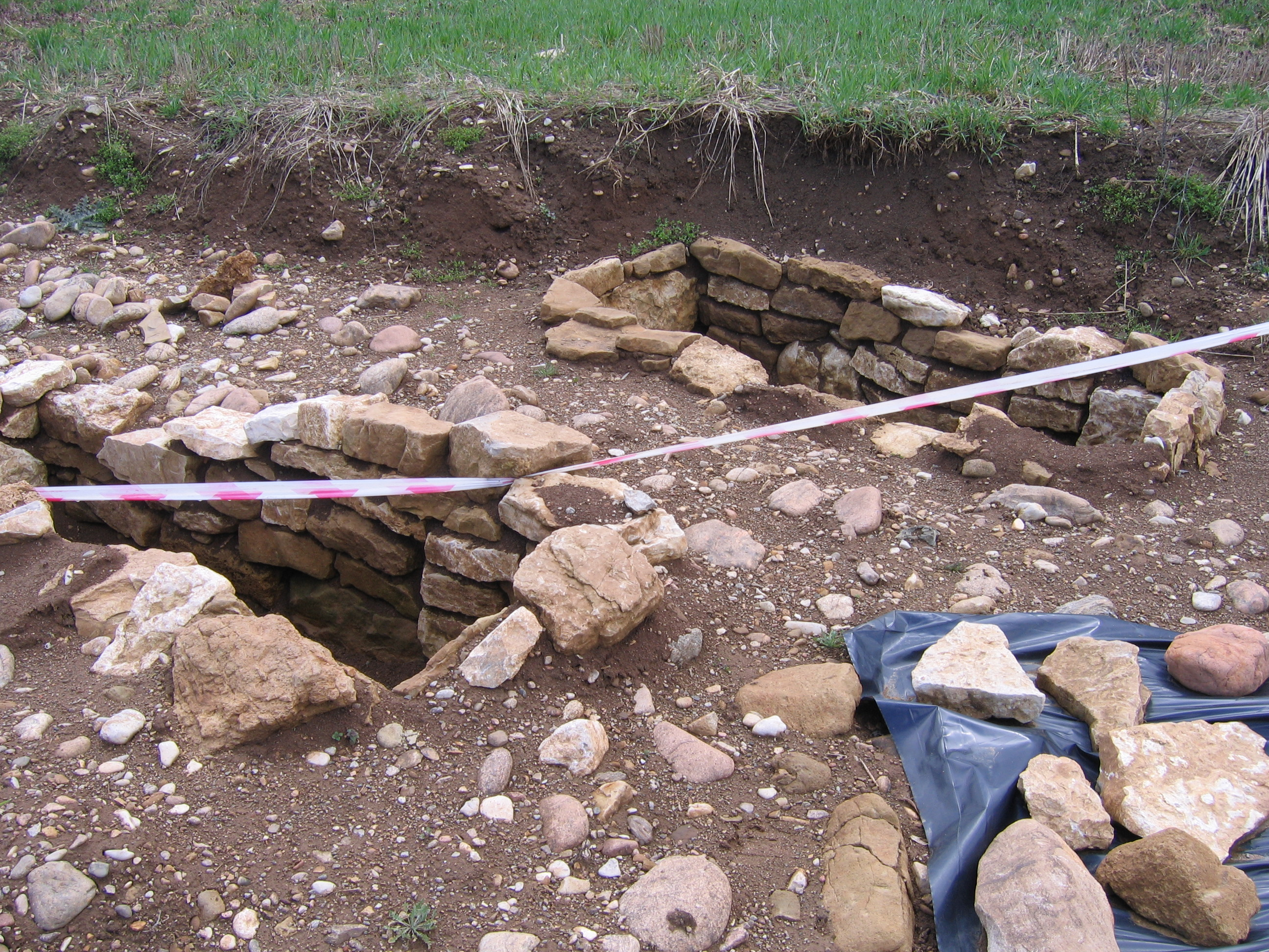 Stühlingen, Landkreis Waldshut, Baden-Württemberg – Ausgrabungen von Merowinger Gräbern.